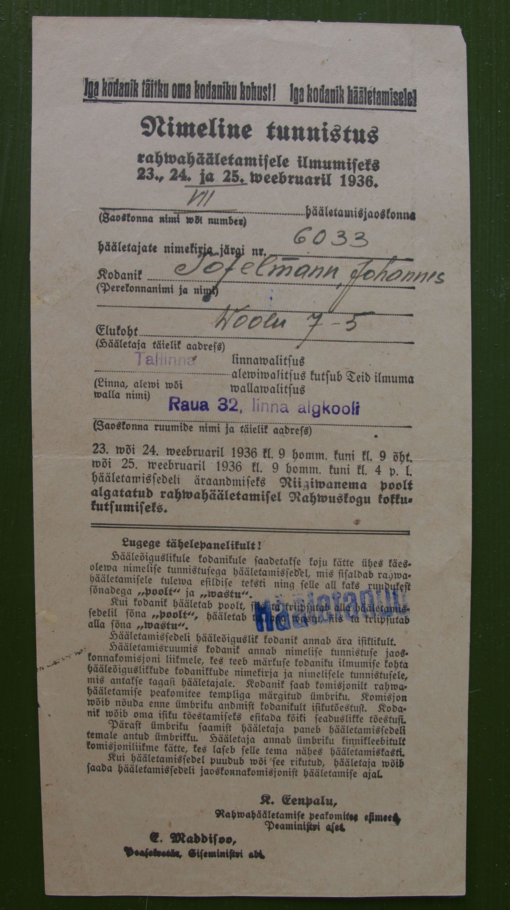 1936. aasta rahvahääletuse nimeline tunnistus